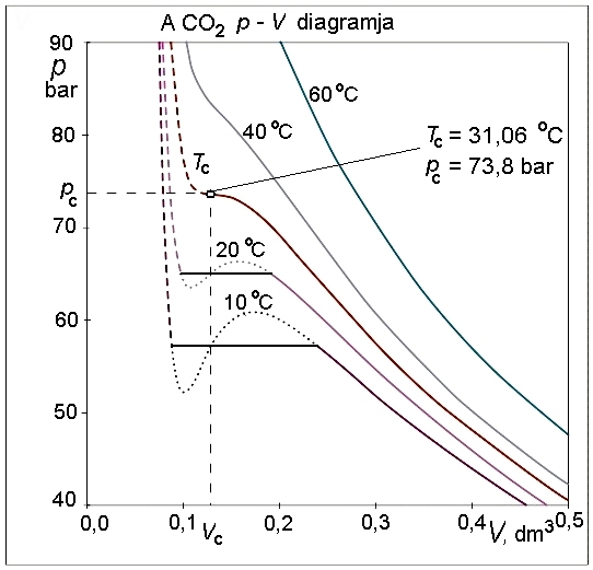 A szén-dioxid p-V diagramja